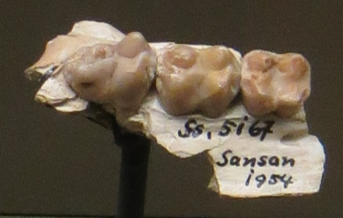 Fossil of Taucanamo - Took the picture at Natural History Museum, Basel